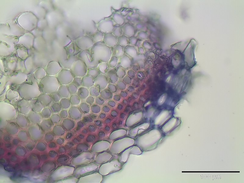 Sphagnum warnstorfii, Stammblatt-Querschnitt, 250x